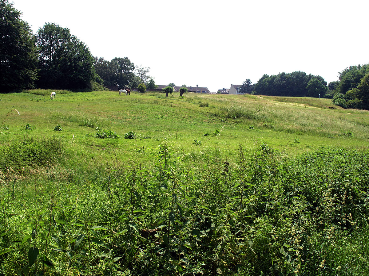 Horbachtal